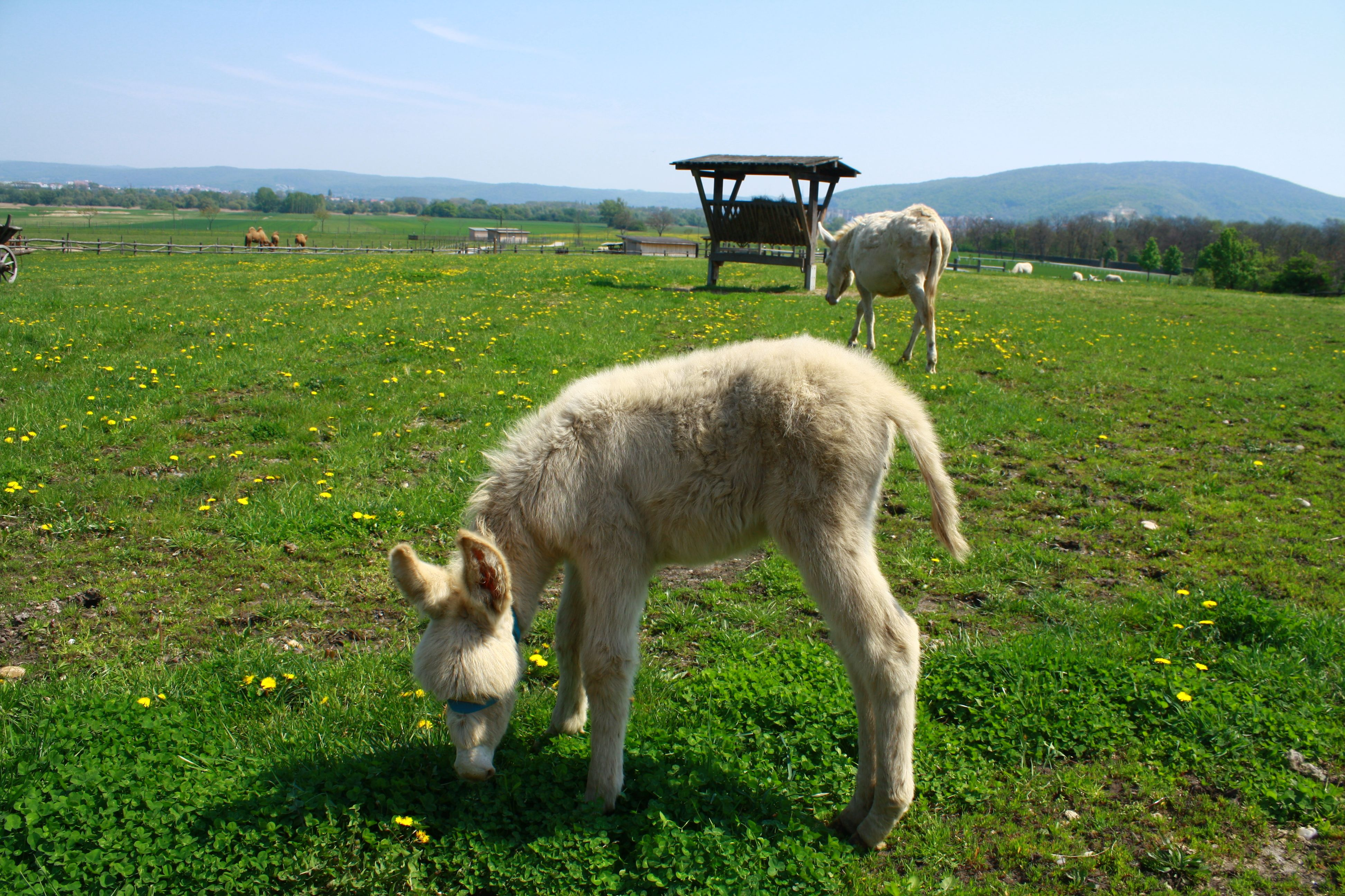 Schloss Hof in Niederösterreich, Austria, junger österreich-ungarischer weißer Esel